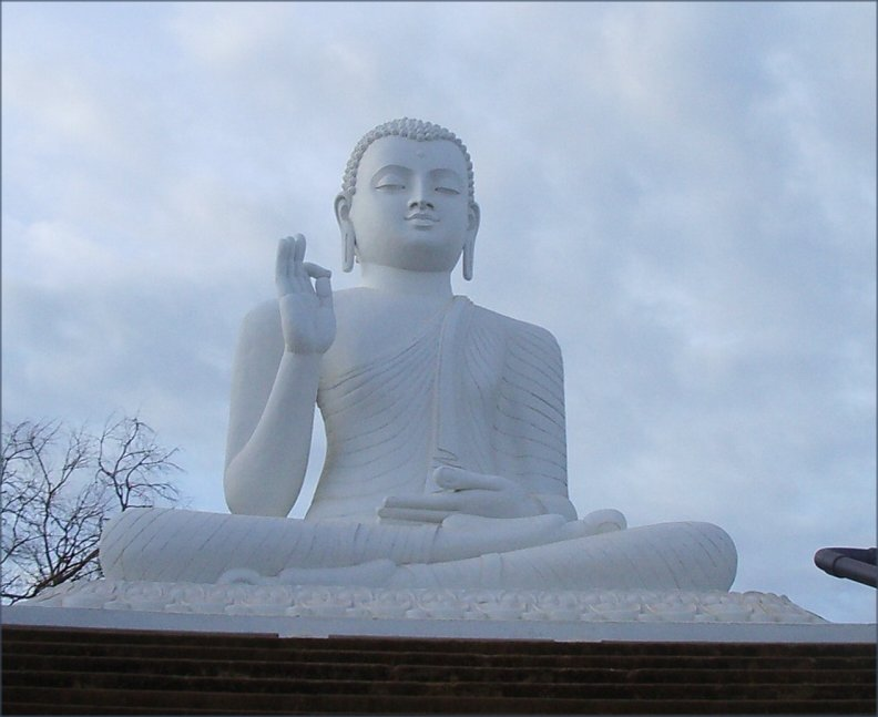 Buda blanc de Mihintale, foto feta per J. Ollé el juliol del 2006